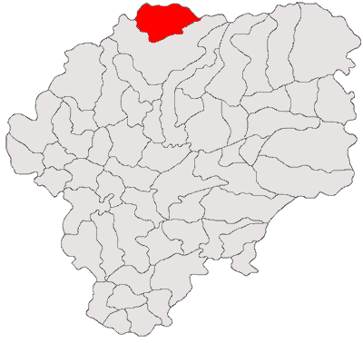 Categorie:Hărţi ale judeţului Bistriţa-Năsăud